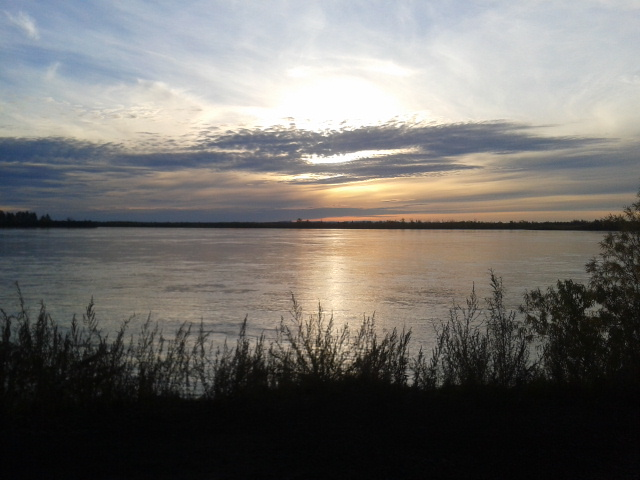 Колыма